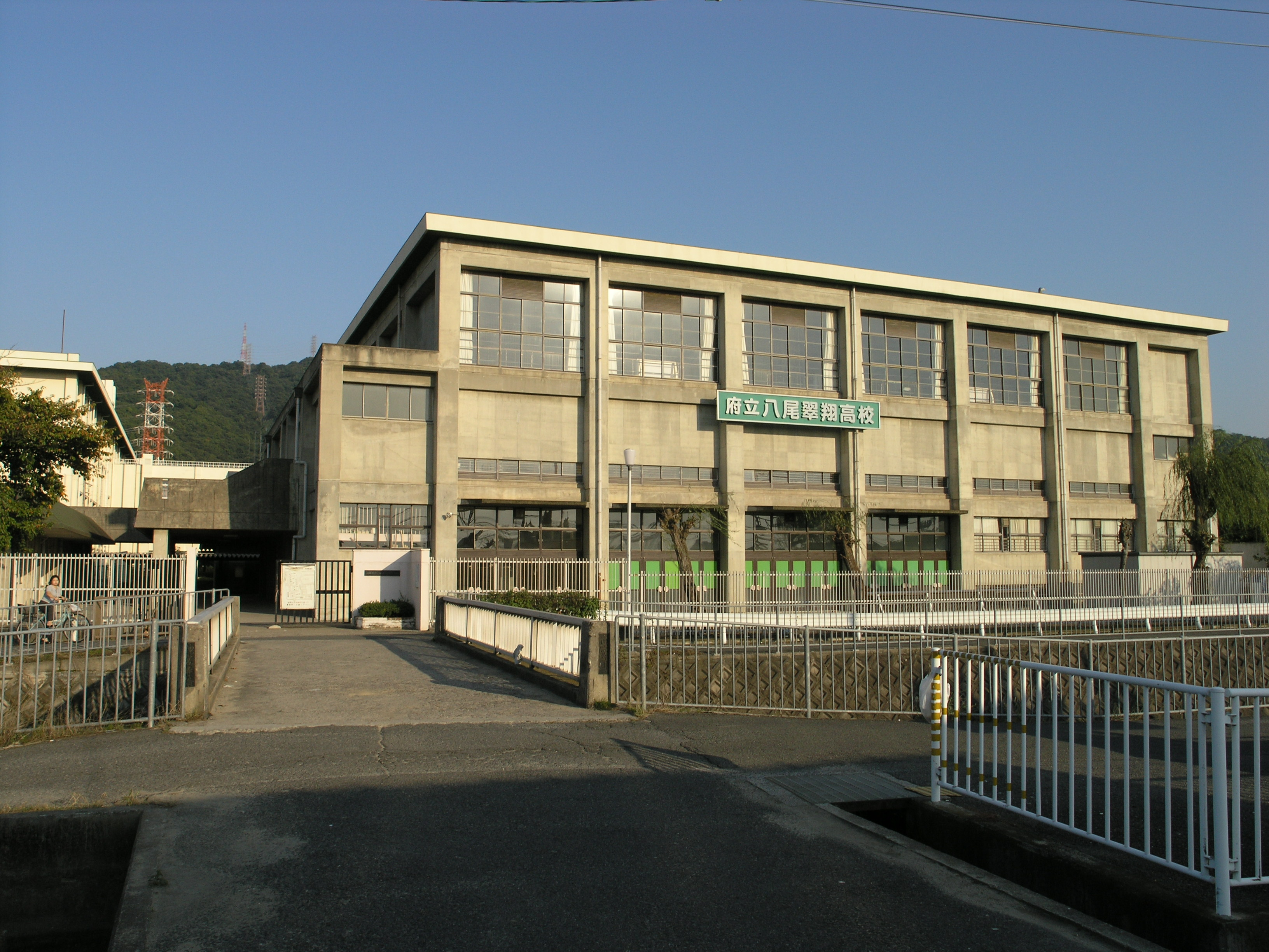 大阪府立八尾翠翔高等学校 (大阪府八尾市)